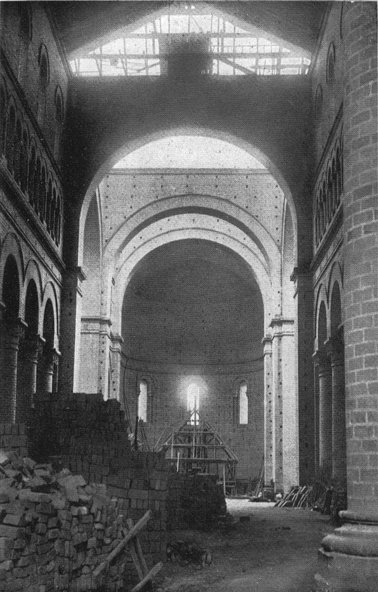 Interior de la Catedral de Medellín en construcción, tomado del libro «Medellín El 20 de Julio de 1910», libro fotográfico de la Sociedad de Mejoras Publicas en conmemoración del primer centenario de la independencia.